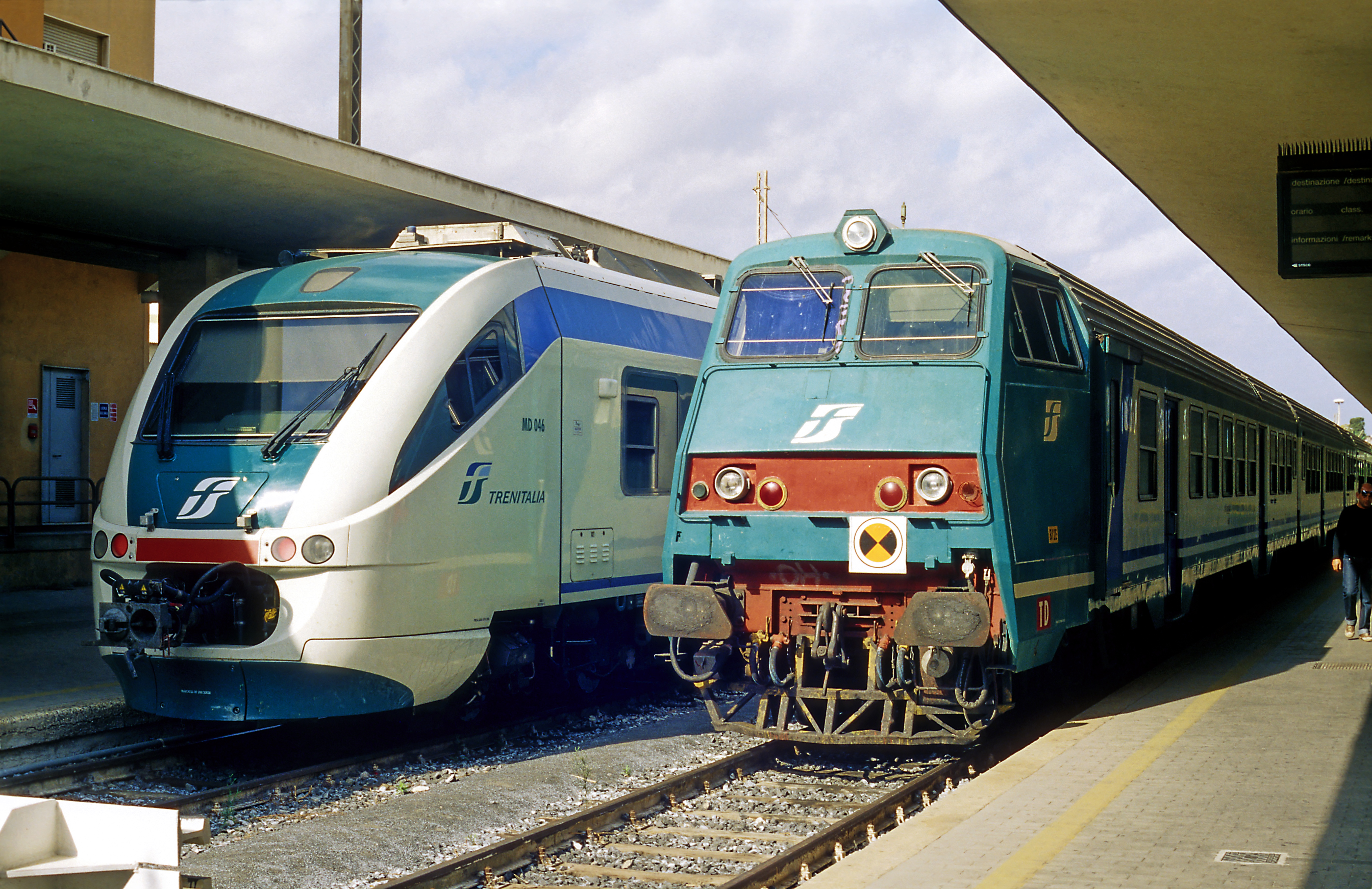 Zugeinheiten auf den Bahnsteiggleisen 2 und 3, links einer der »Minuetto«-Dieseltriebwagen der Reihe ALn 501/502, rechts ein MDVC-Steuerwagen.